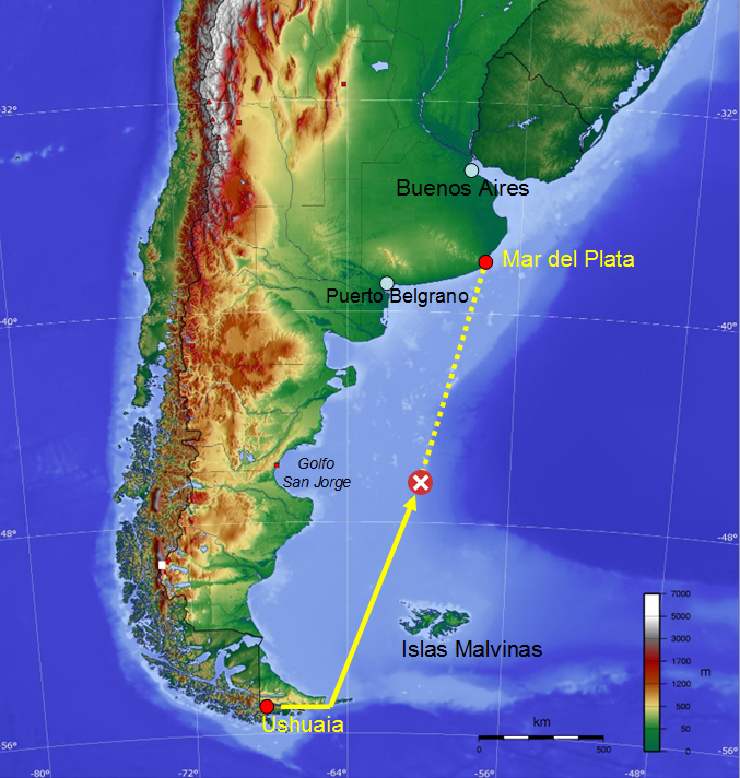 Mapa. Ubicación de la última posición conocida del submarino ARA San Juan (S-21) de la Armada Argentina, antes de desaparecer el 15 de noviembre de 2017. Latitud 46º 44' (S); Longitud 060º 08' (W). Fuente: Infobae